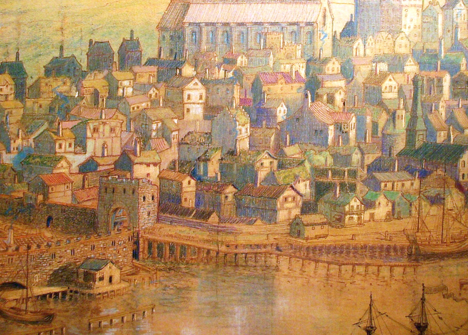 Stockholmspanorama efter Hogenberg från Södermalm, del av området kring söderport